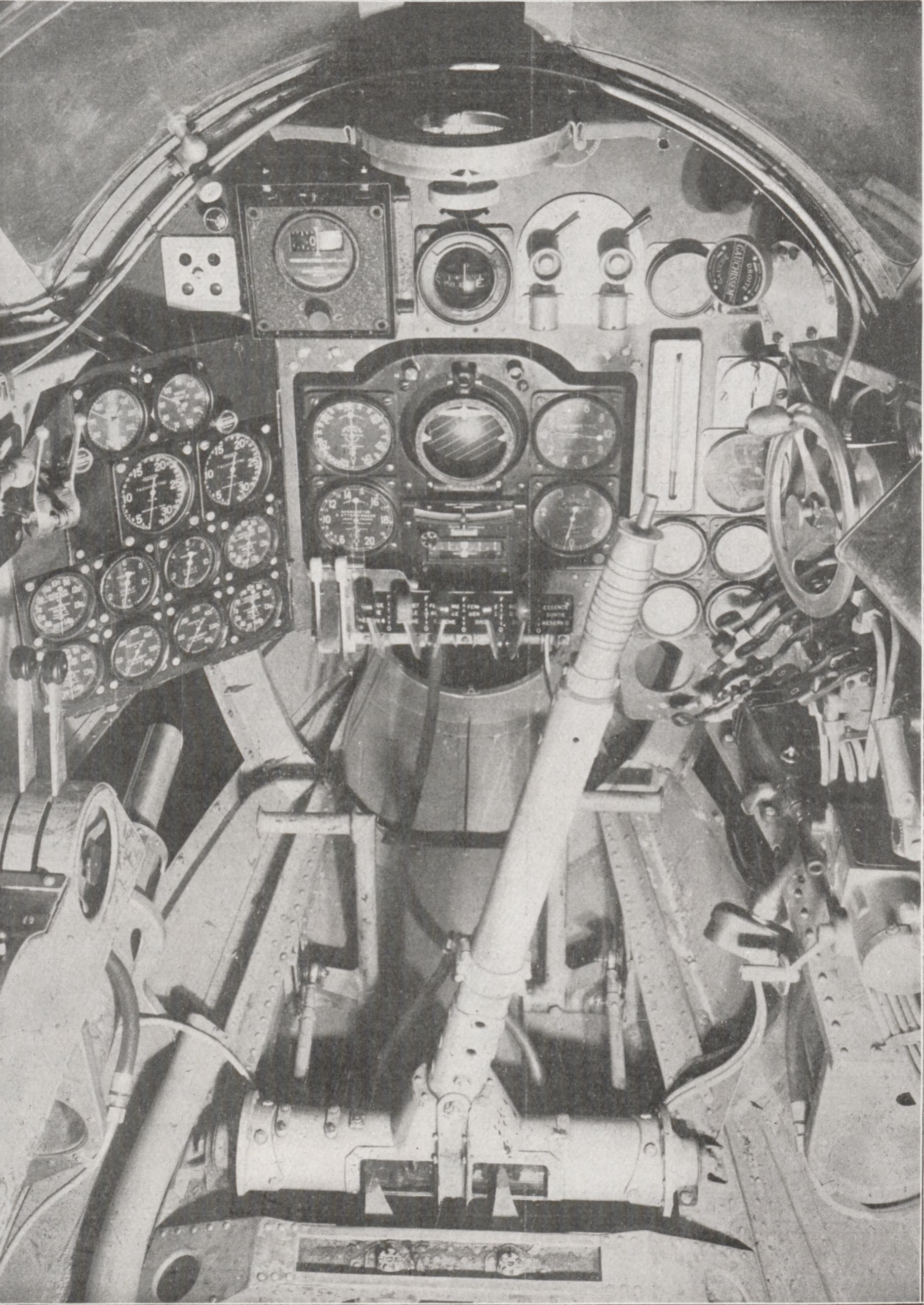 Poste de pilotage du bimoteur de chasse et de bombardement léger BREGUET 690